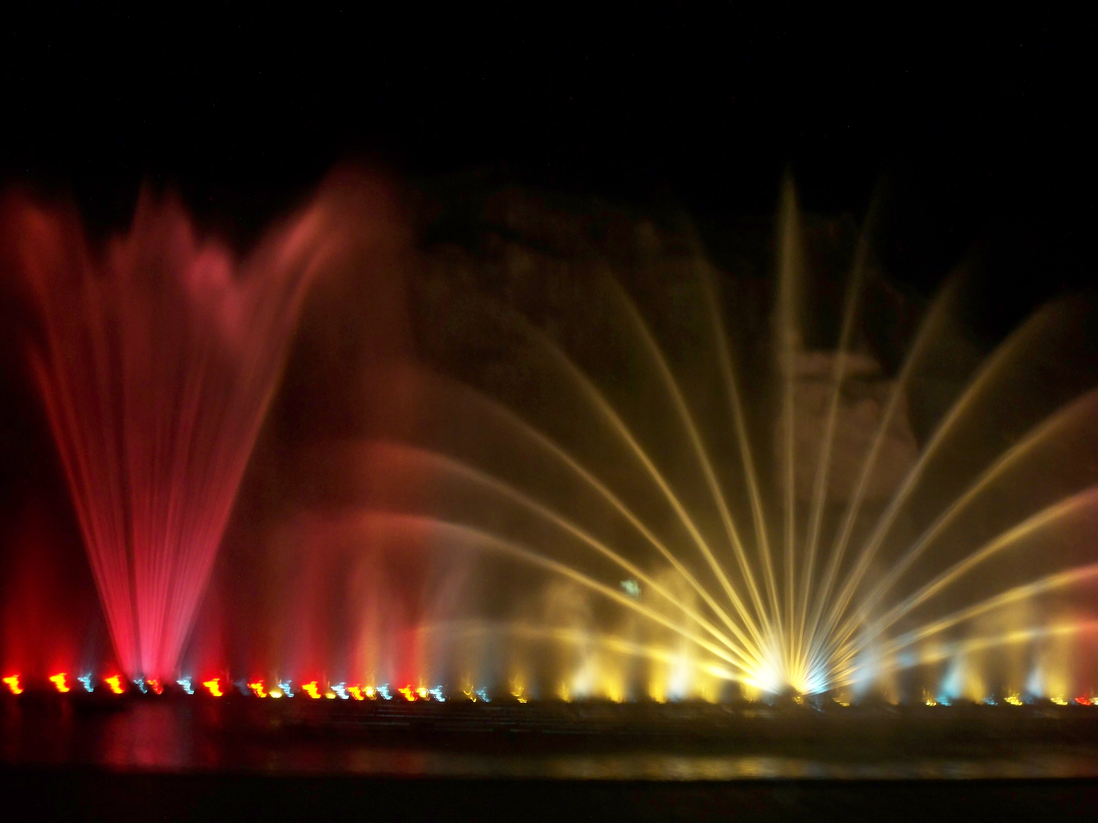 Nhạc nước Vinpearland